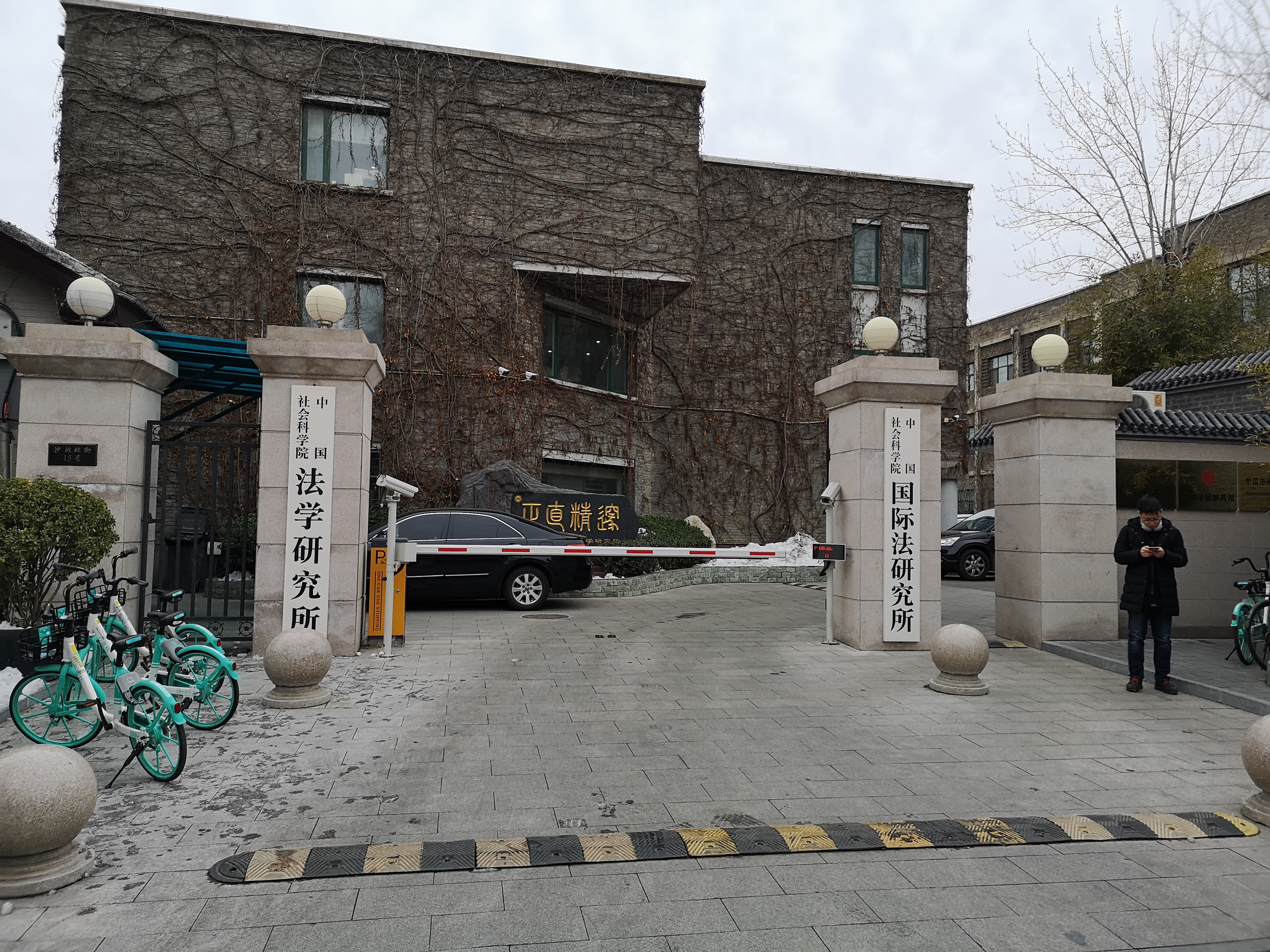 中國社會科學院法學研究所大門，2020年1月7日拍攝